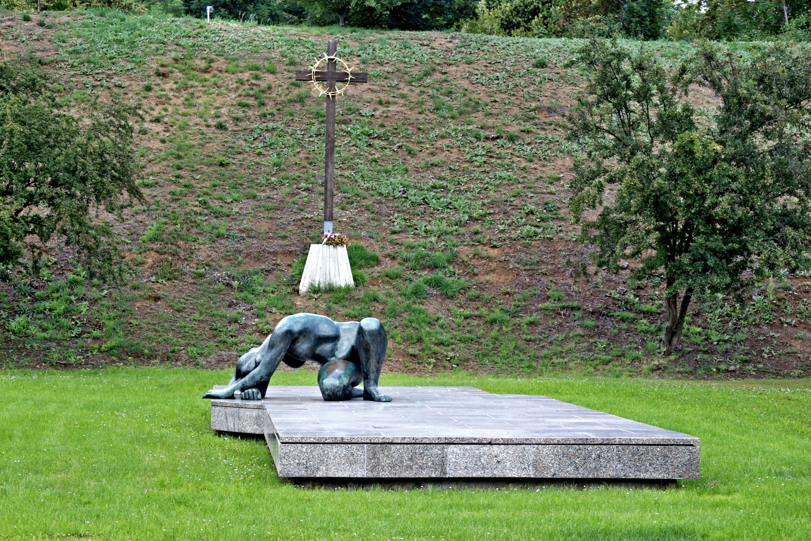 Kobylisy památník zastřeleným osobám